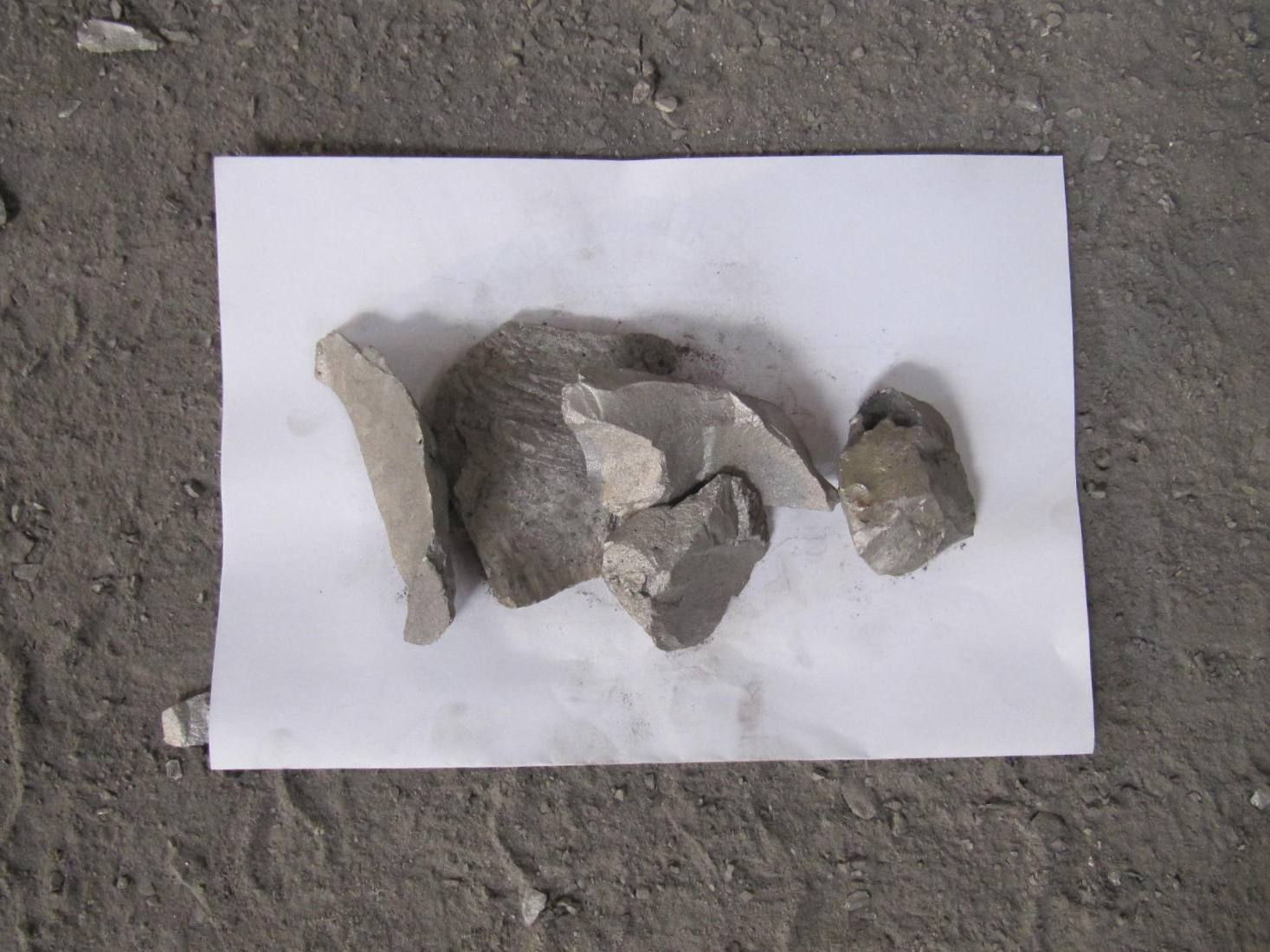 Echantillons de ferrotitane à 70% de teneur en titane, utilisés en sidérurgie (posés sur feuille A4)